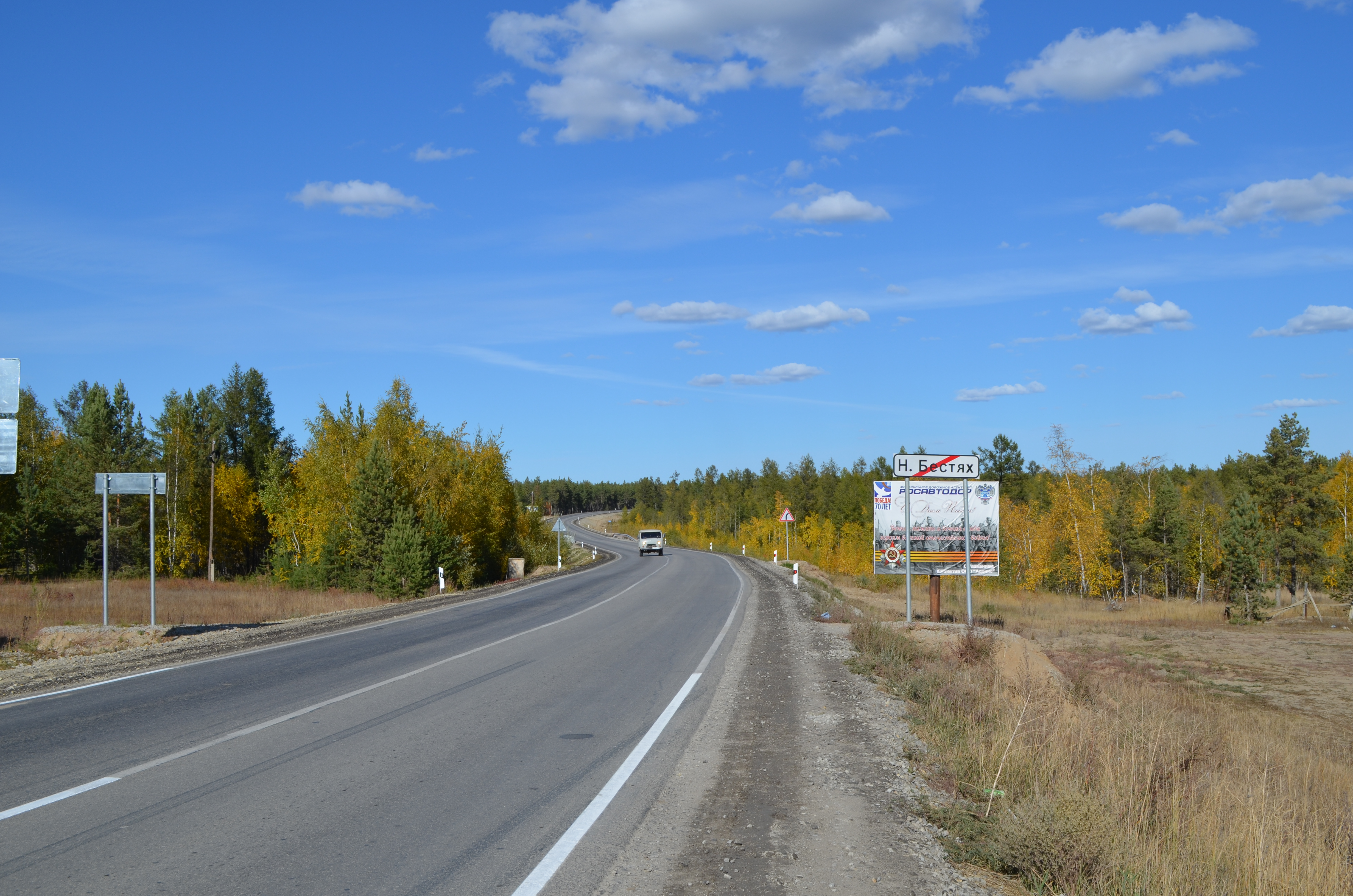 Якутия, Мегино-Кангаласский район